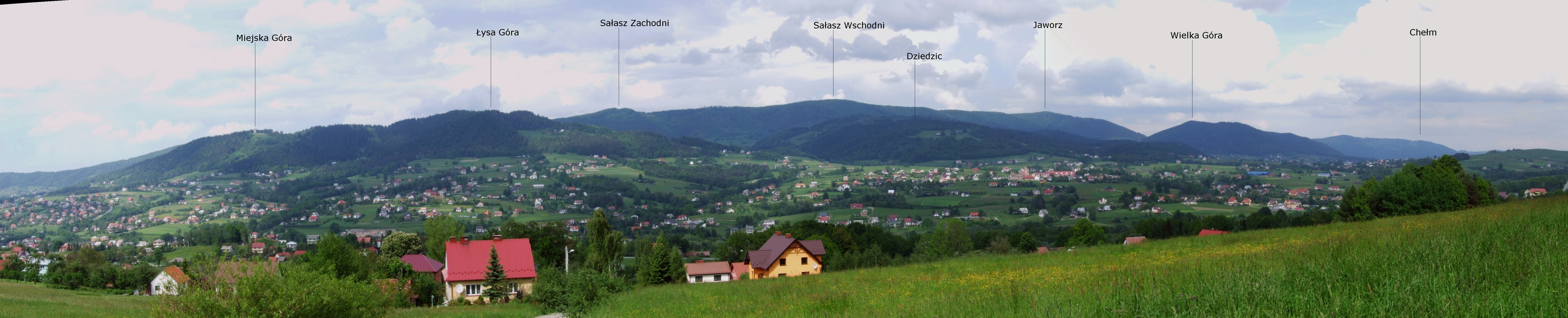 Panorama z wzgórza Jabłoniec w Limanowej